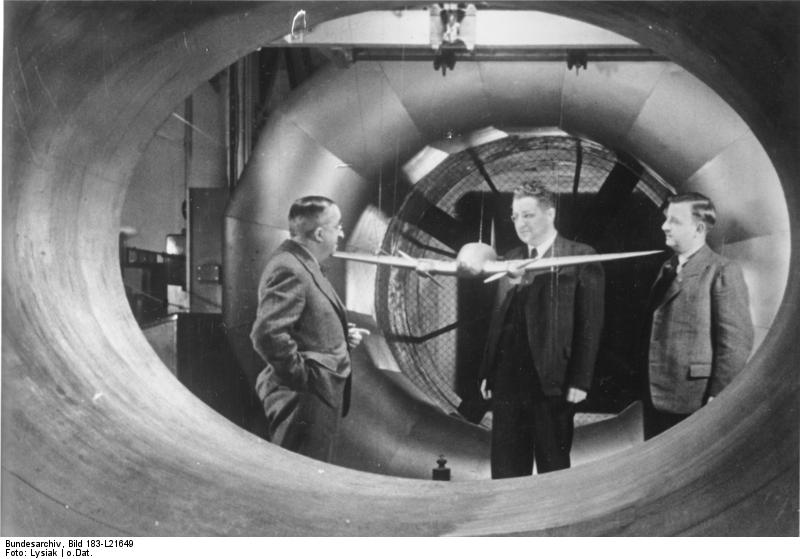 Vom Modell zur He 111 Im Windkanal der Heinkel-Werke neben dem Windkanalmodell einer He 111 Heinkel bei einer Besprechung mit seinen Chefkonstrukteuren. (links Prof. Dr. Ernst Heinkel, in der Mitte Siegfried Günter, der Konstrukteur der He 111, rechts der Heinkel-Konstruktionschef Karl Schwärzler) Aufn.PK-Lysiak